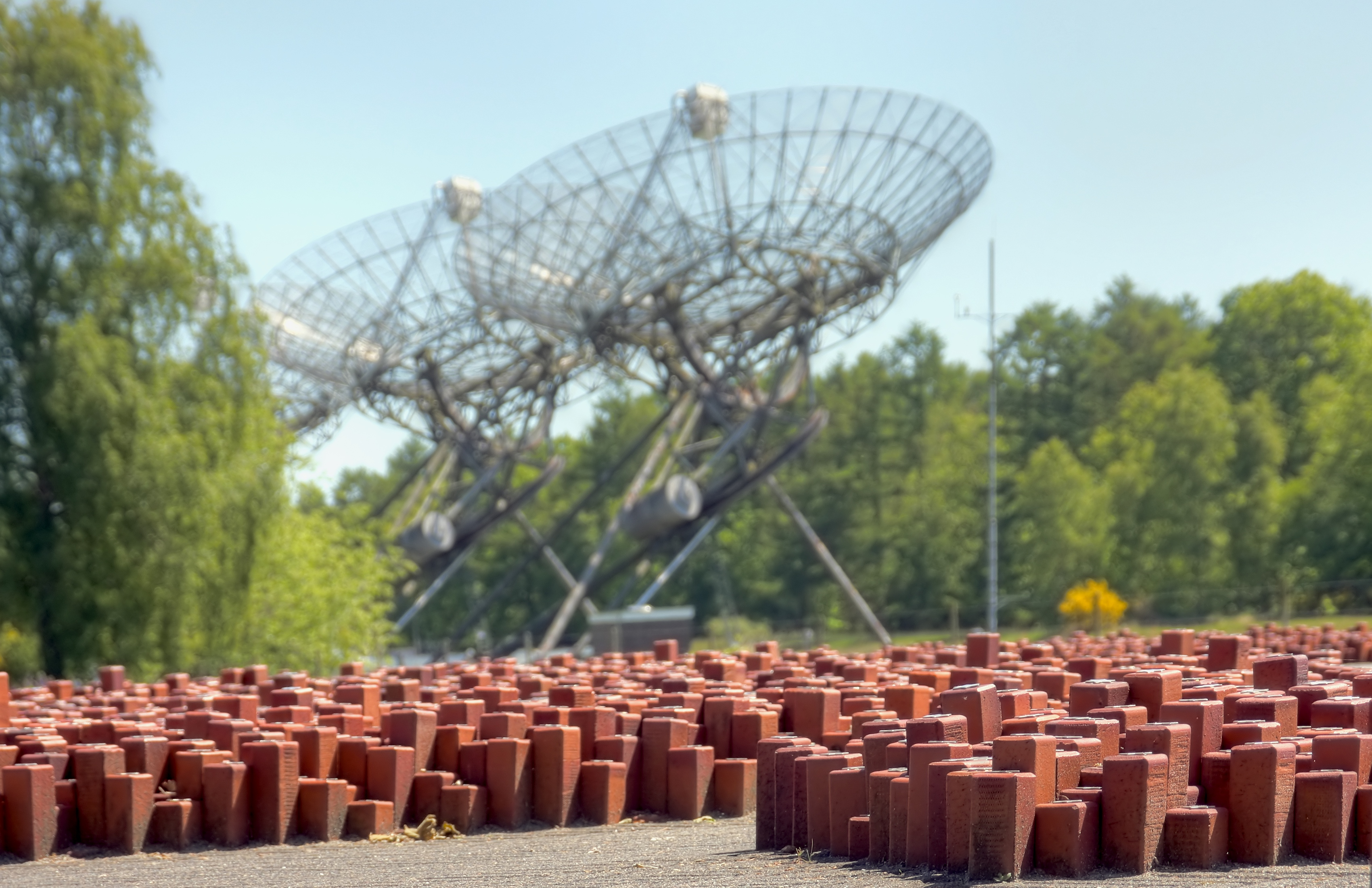 Vordergrund: Gedenkstätte des Durchgangslager Westerbork, Hintergrund: Westerbork Synthesis Radio Telescope WSRT. Niederlande